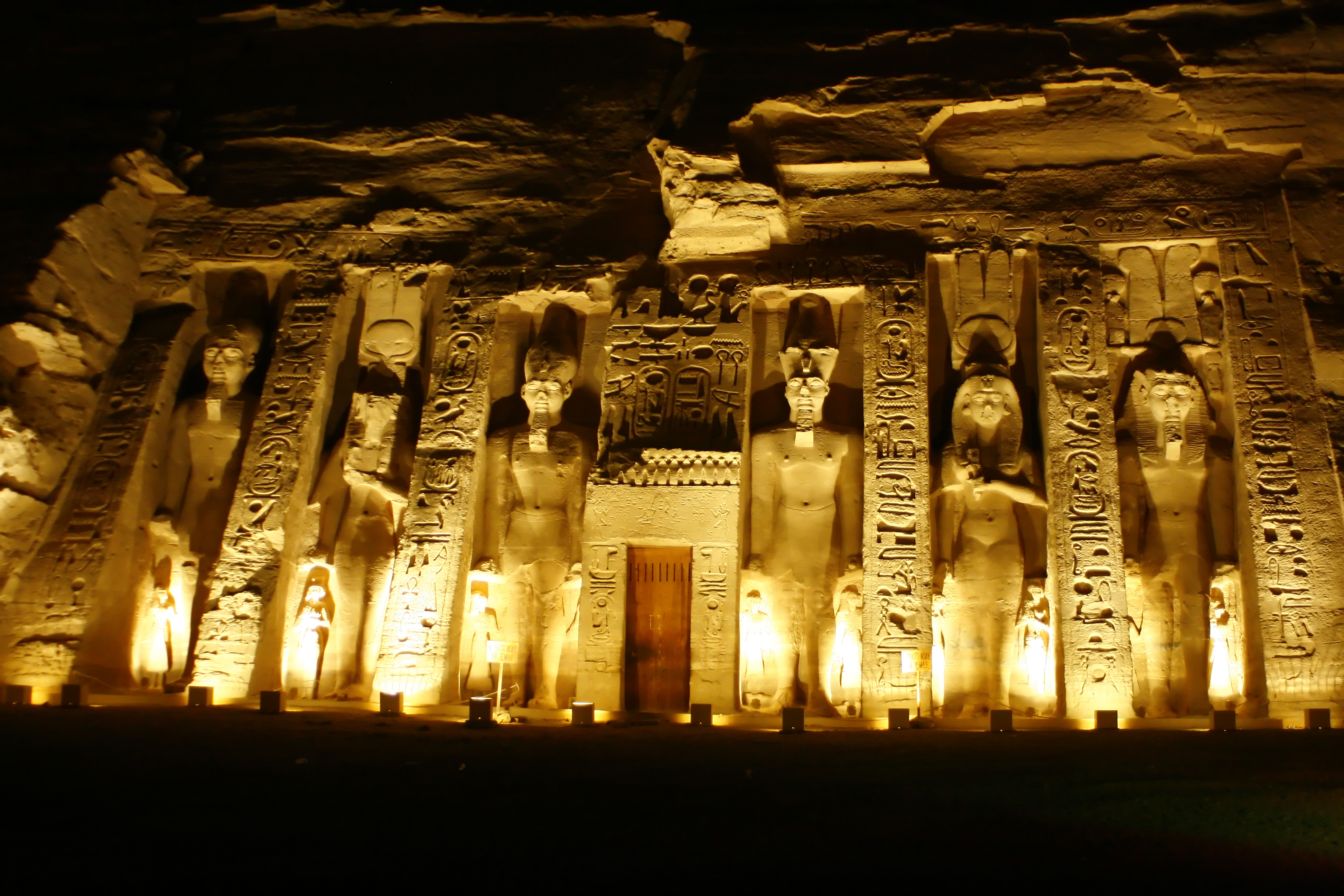 Abu Simbel